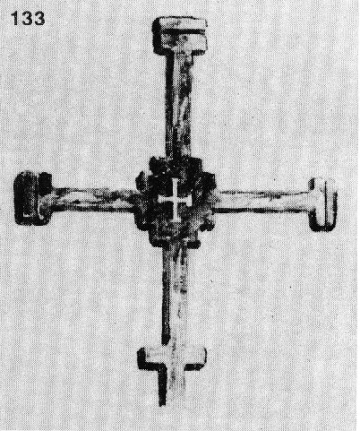 133. Кръст-акротерия върху купола на иконостаса в манастира „Св. Илия", гр. Тетевен. Изработен е през 1874 г. (дата върху иконостаса) от дърво и вапцан с тъмнозелена маслена боя. Равнокрилен, крилата му завършват с напречни дъсчици; по средата му има четвъртито табло с врязани навътре ъгли, върху което от двете страни е изписано по едно кръстче с бяла боя. Размери: 20x27x0,5 см. Скициран на 17.VП.1916г. (Т. 7,обр. 14.)